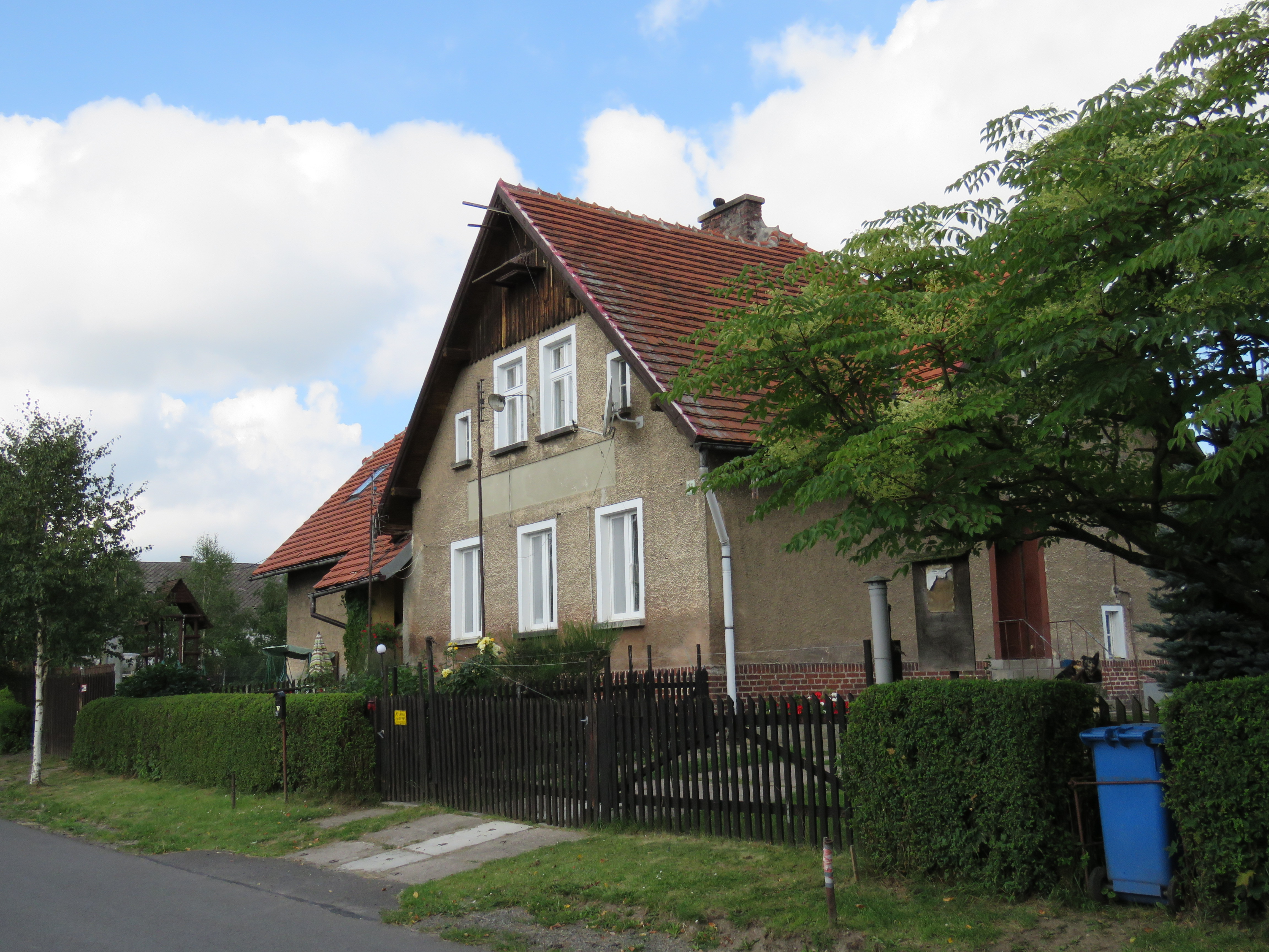 Były budynek Szkoły Podstawowej w Lipienicy.